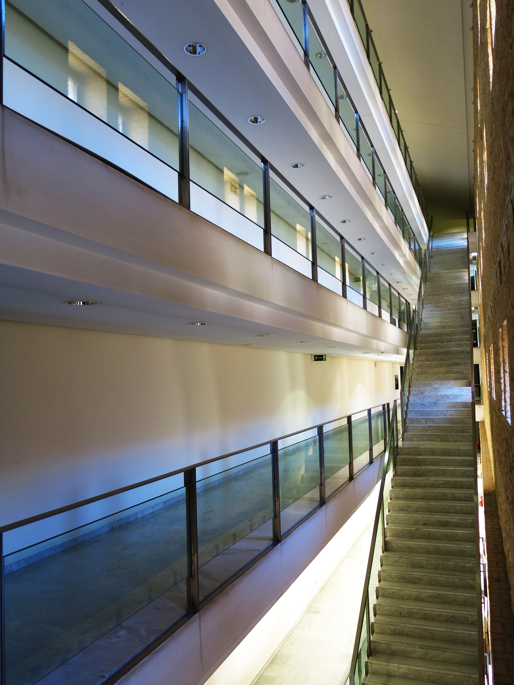 Sant Miquel dels Reis (València), passadís dels dipòsits de la Biblioteca Valenciana